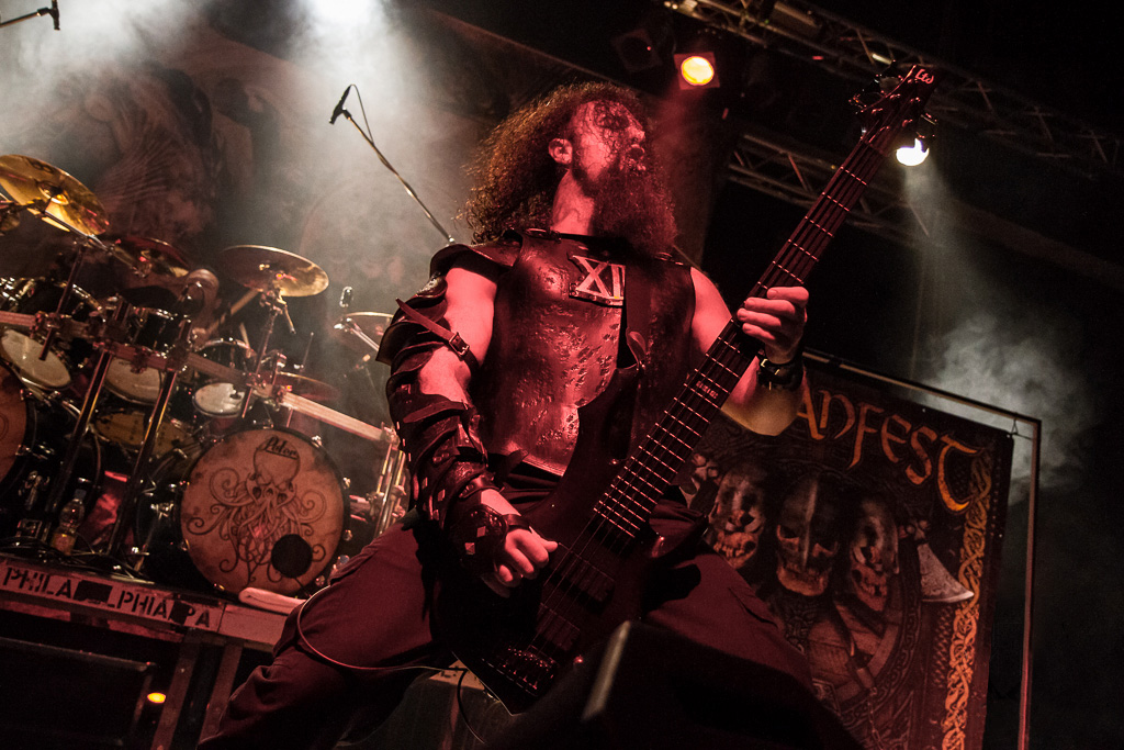 Ex Deo - Paganfest 2013 Wuerzburg - 01-03-2013